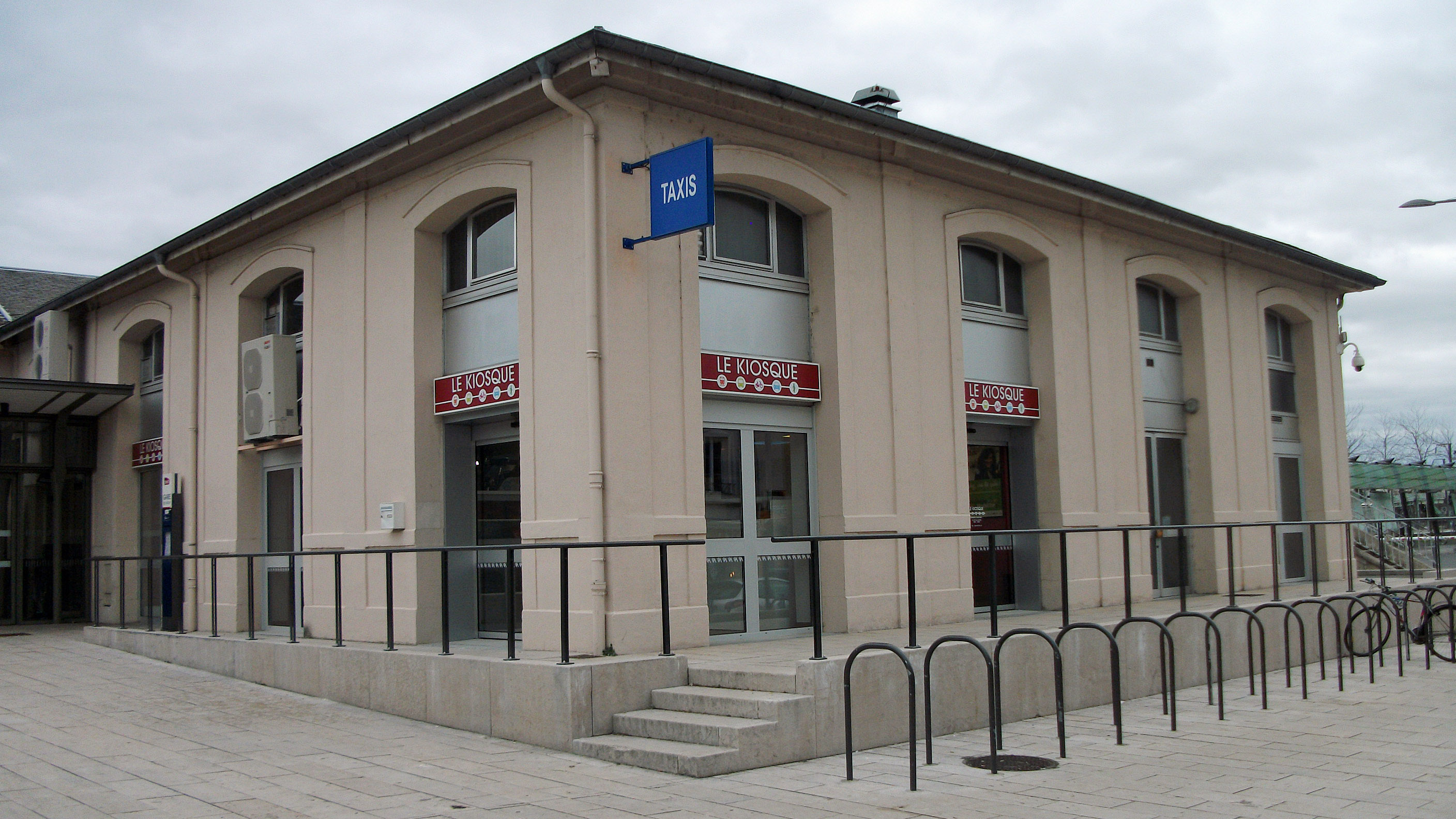 Aile sud-ouest du bâtiment voyageurs de la gare de Vichy abritant désormais le kiosque Vichy Val d'Allier - MobiVie - Trans'Allier - SNCF, mis en service le 19 février 2014. Devant, un parking de 40 places (20 arceaux). 1 seul vélo stationne devant.